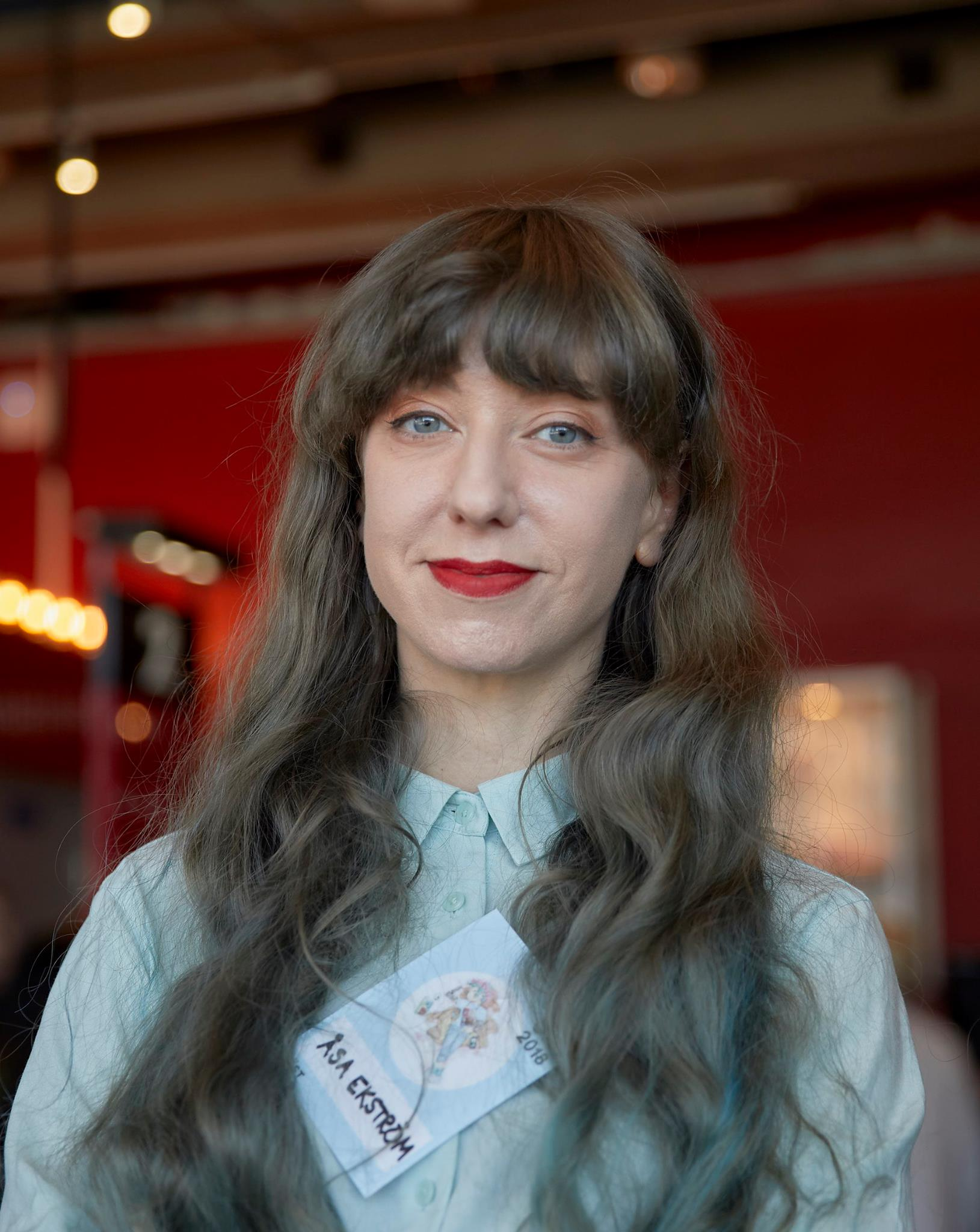 Åsa Ekström, fotograferad under Stockholms internationella seriefestival 2018.